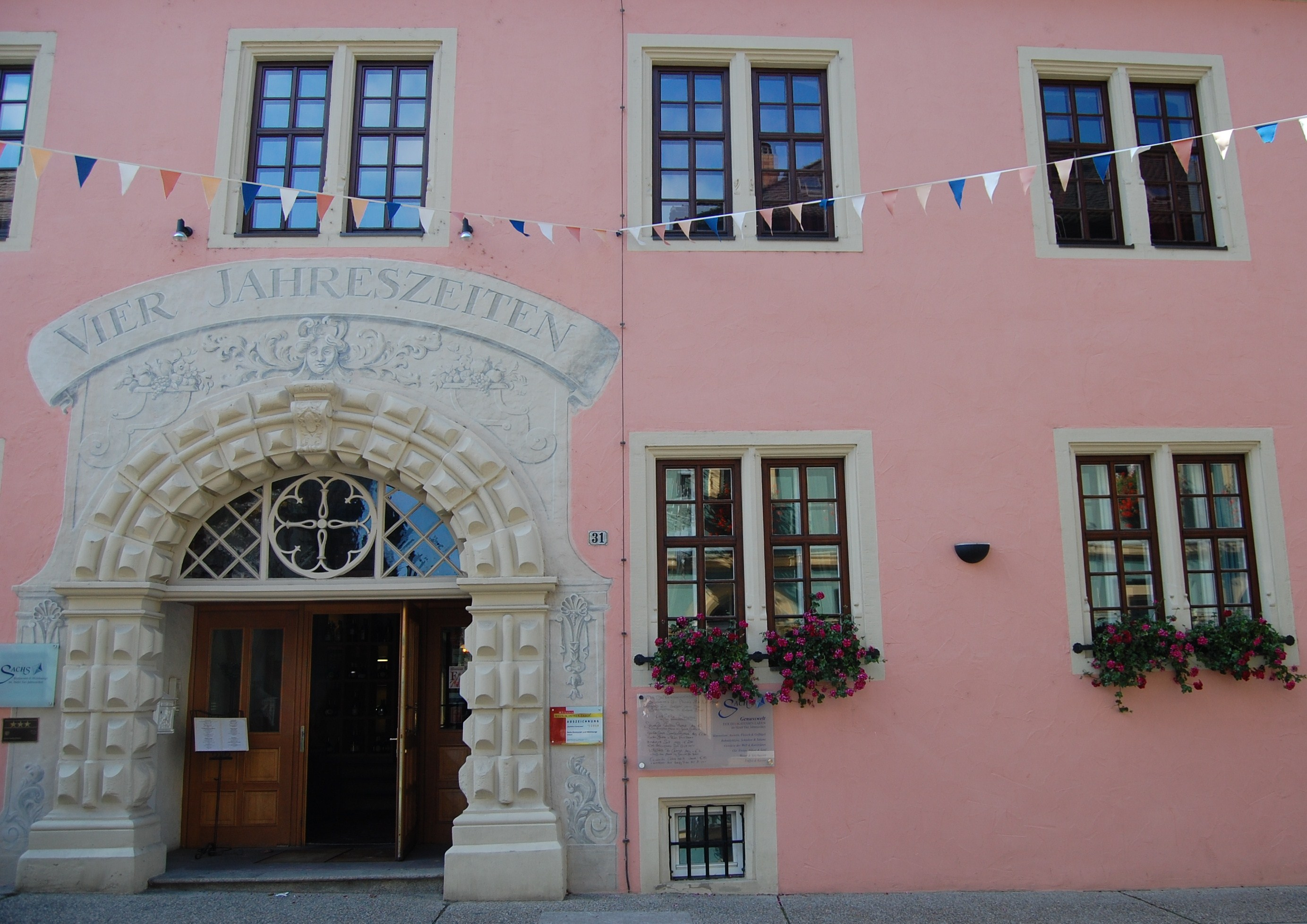 Echterhof (1605) in Volkach, früher Amtshaus und Amtsgericht, heute als Hotel genutzt